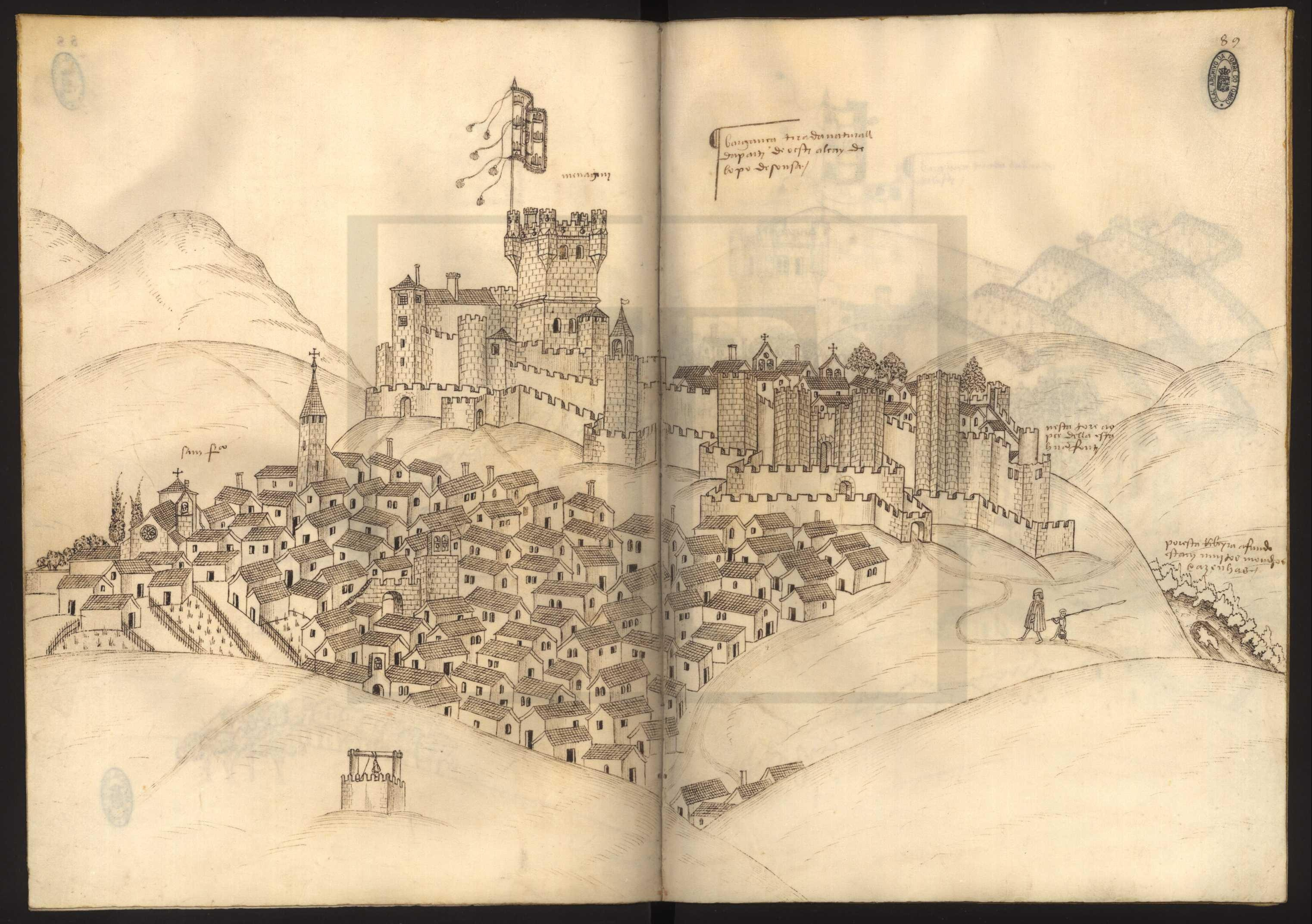 Livro das Fortalezas 89 - Bragança